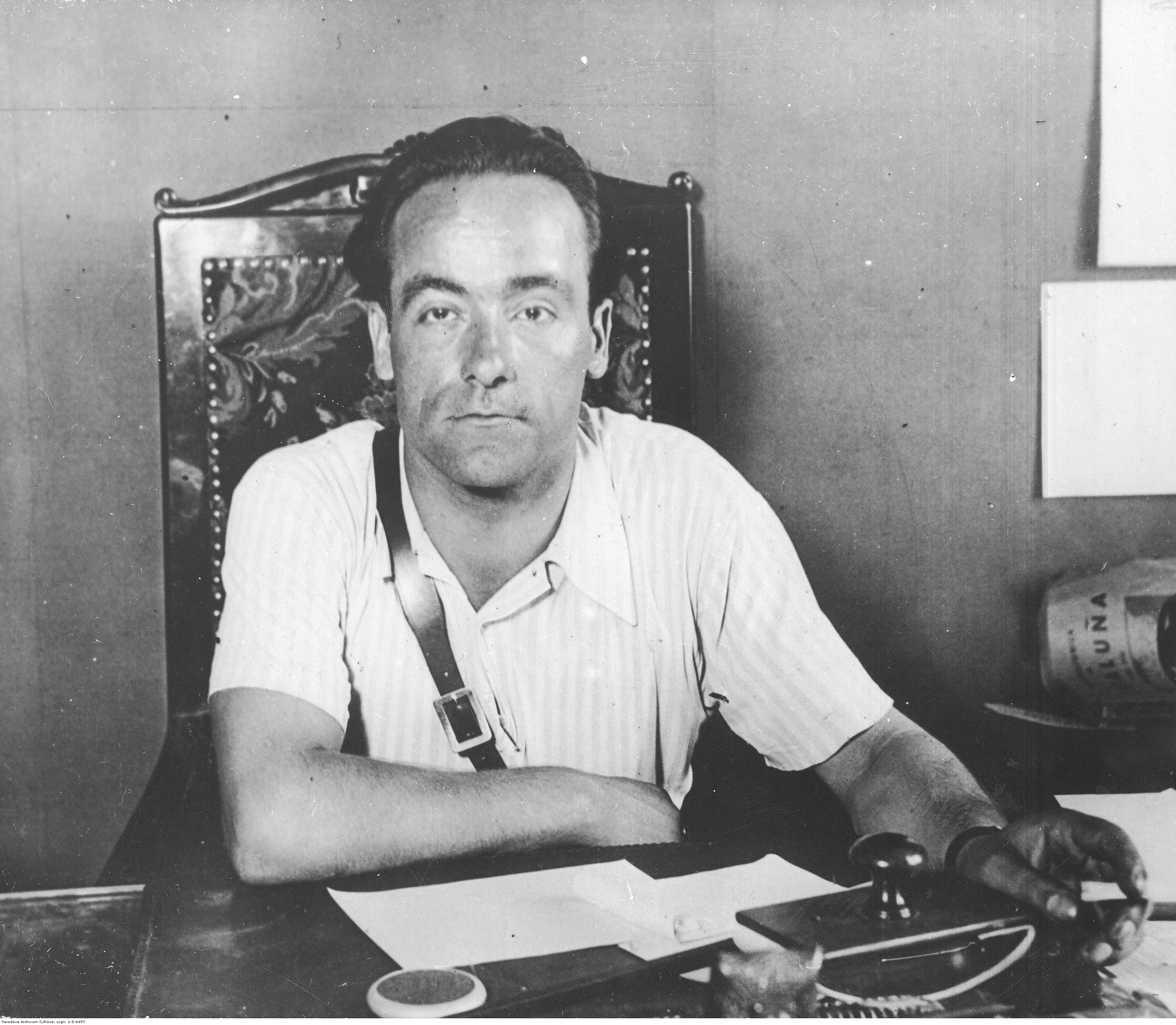 Juan García Oliver, anarquista español, ministro de justicia del gobierno de Francisco Largo Caballero.